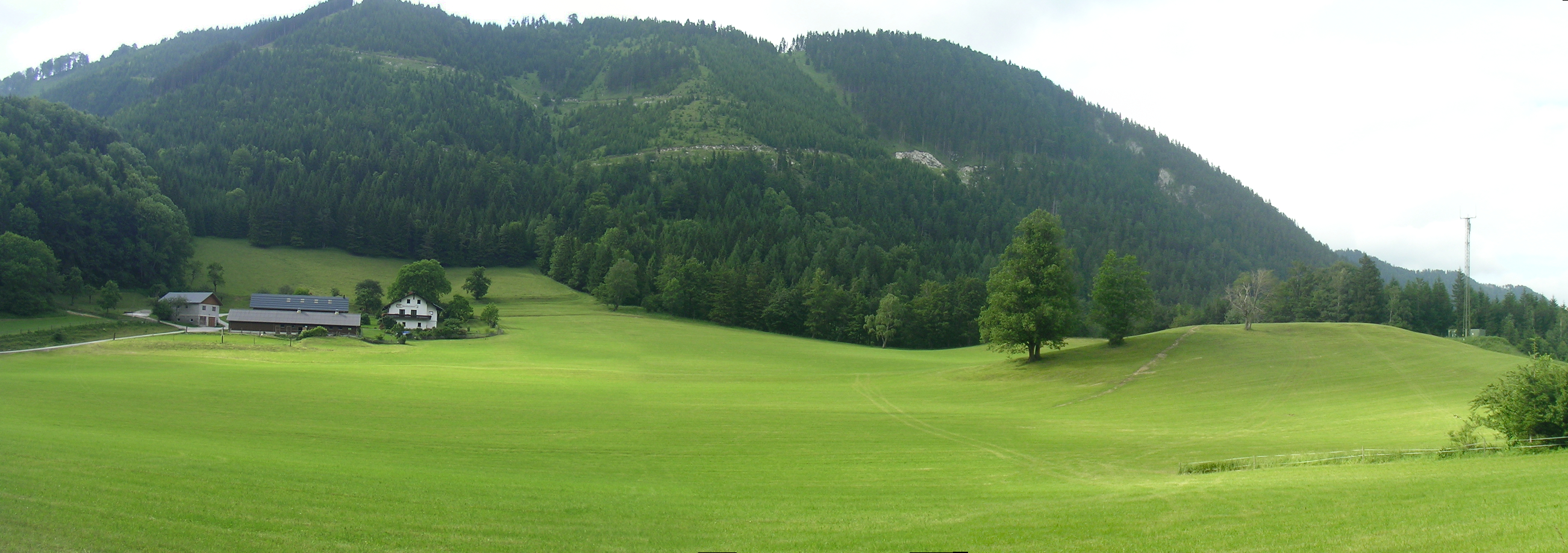 Blick vom Klostertaler Gscheid Richtung Norden